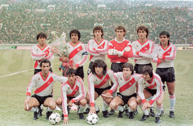 River Plate campeón de la Copa Intercontinental 1986.